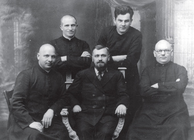 Лідары БХД. Сядзяць злева направа: Адам Станкевіч, Язэп Германовіч, Вінцэнт Гадлеўскі Вільня 1930-я гады БДАМЛіМ